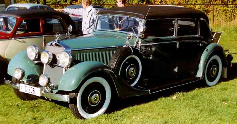 Mercedes-Benz 290 Cabriolet D 1936